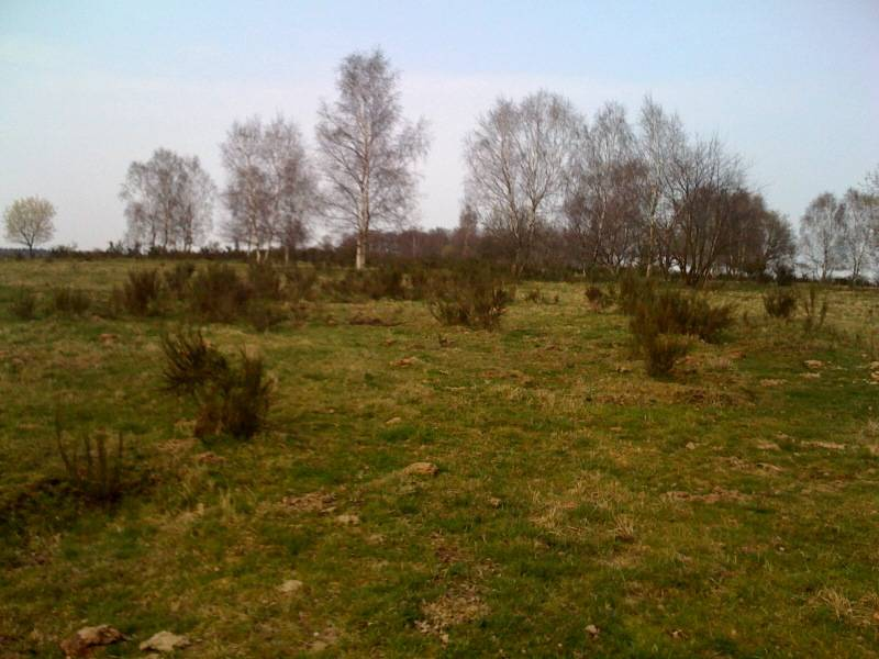 Zentraler Bereich des Naturschutzgebiets Bockhorst bei Güstrow, Mecklenburg-Vorpommern. Die zunehmende Verbuschung der beweideten Flächen mit Ginster ist zu erkennen. Bodenunebenheiten bilden ehemalige Einschlagflächen von Granaten u.ä. - Google Maps - Google Earth